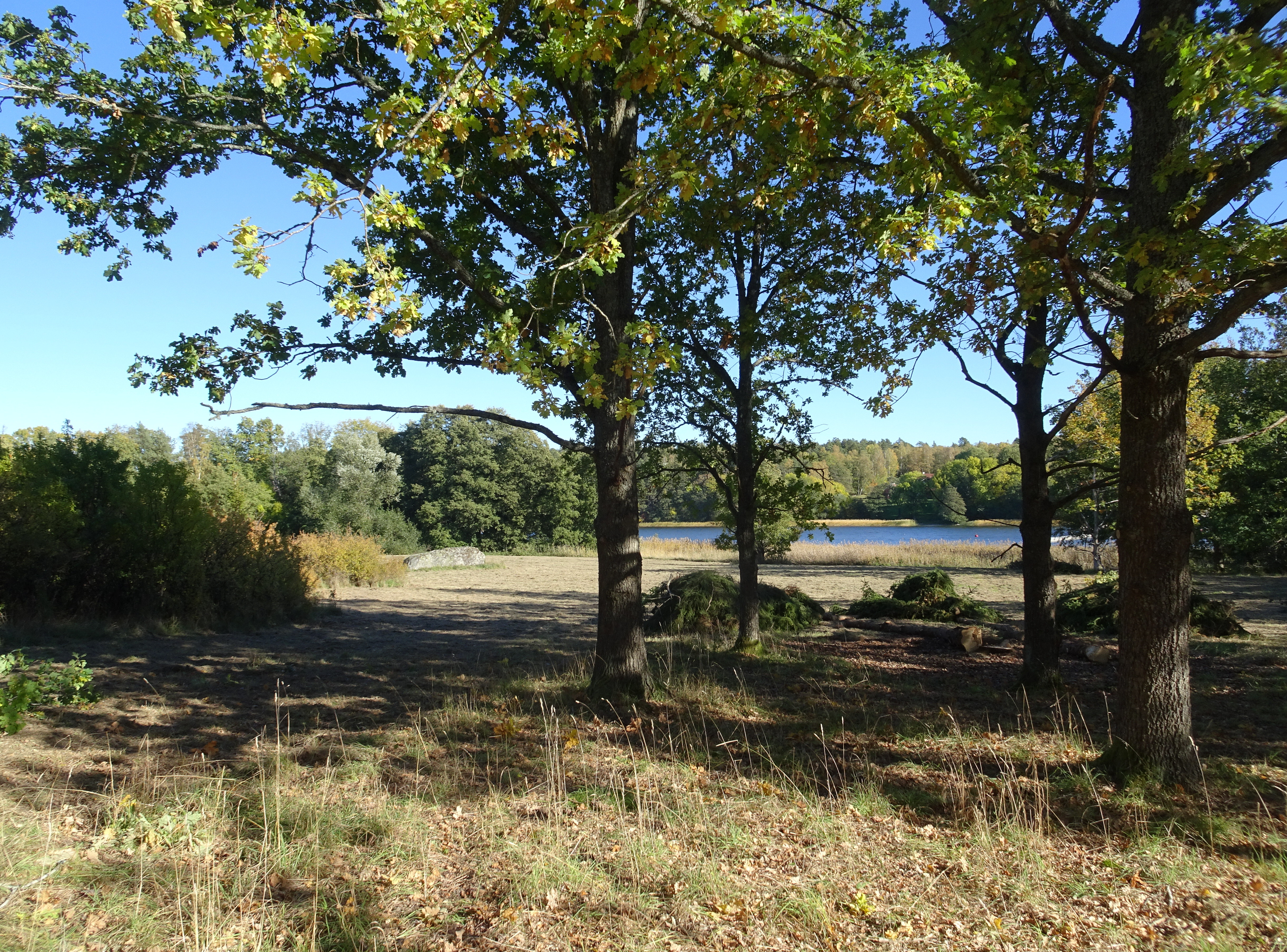 Skeftinge torpplats